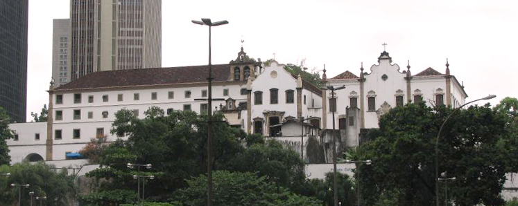 Convent of Santo Antônio in Rio de Janeiro